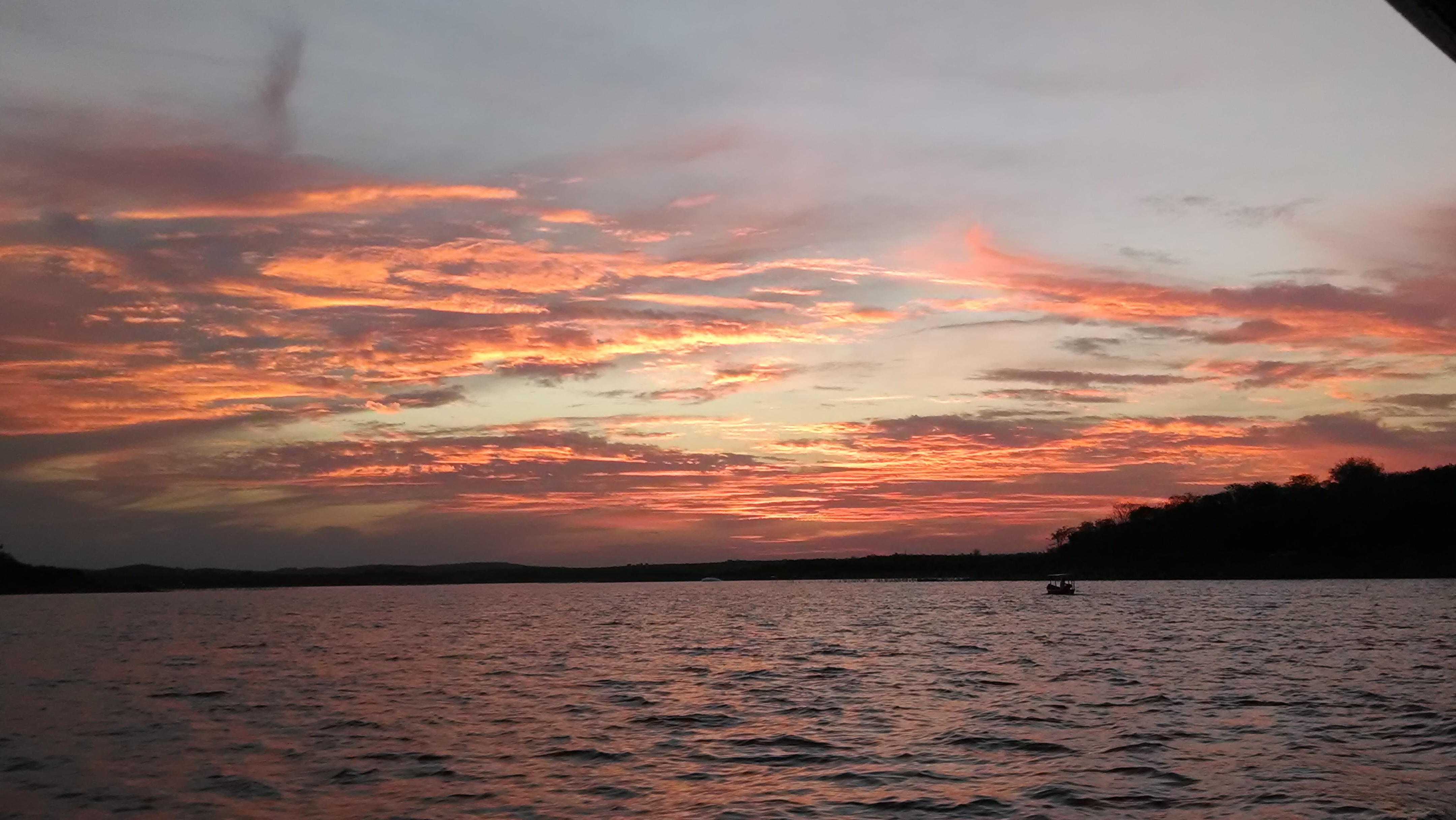 Pôr do sol na Ilha da Amizade. Iguatu,Ceará.